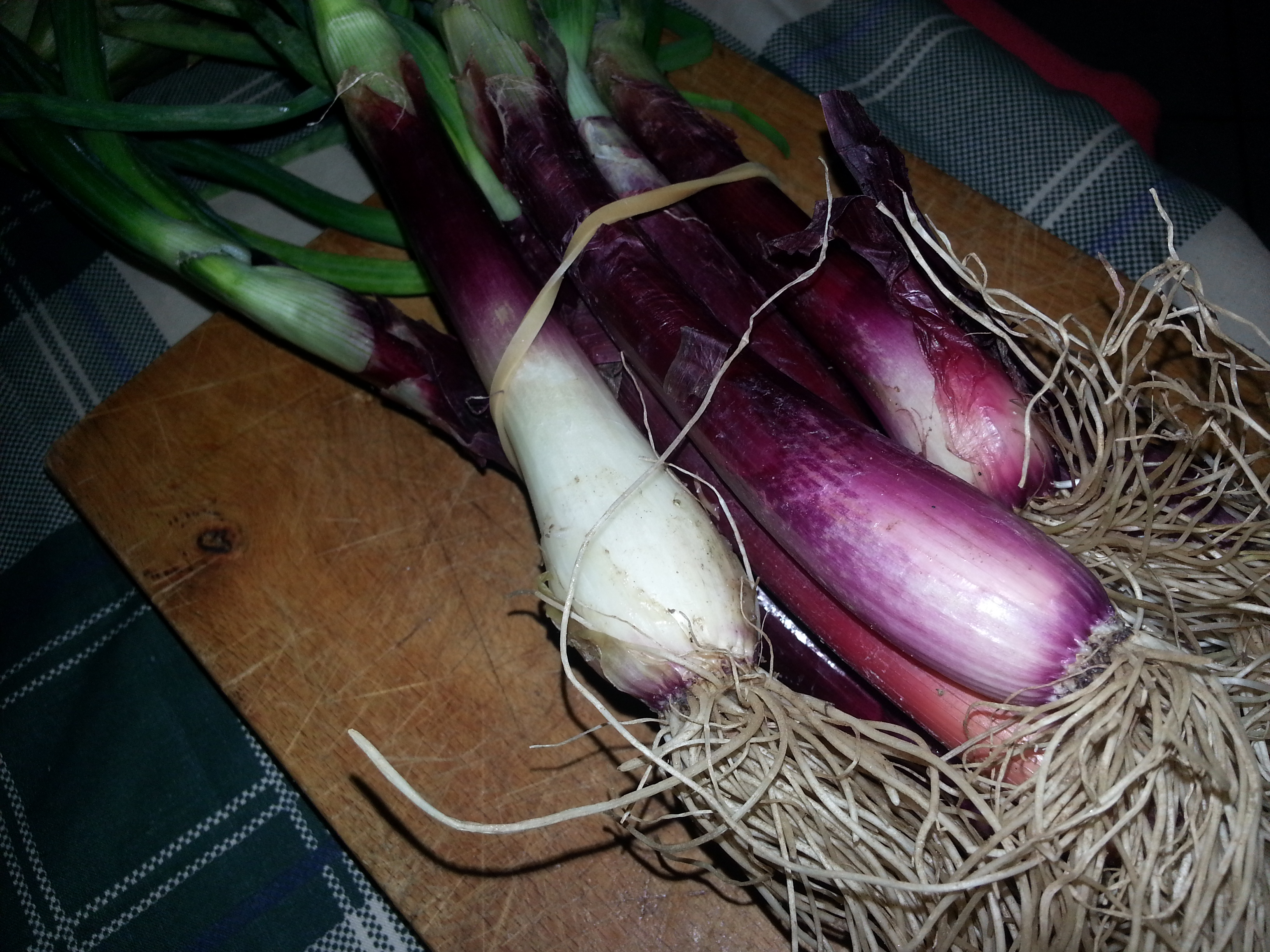 Cipollotti freschi Tropea